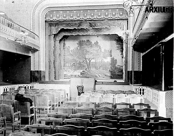 Interior del teatre del Centre Catòlic, que estava situat a la plaça de l'Església. A la platea, el capellà de la parròquia assegut en una cadira.